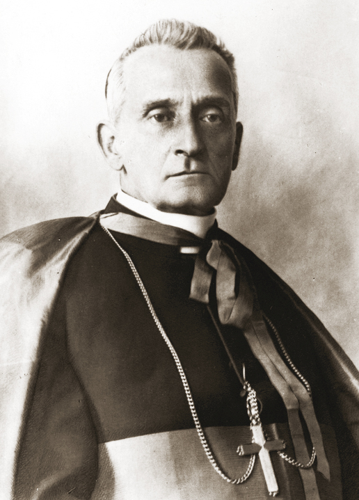 Cardinal Adam Stefan Sapieha (1897-1951)